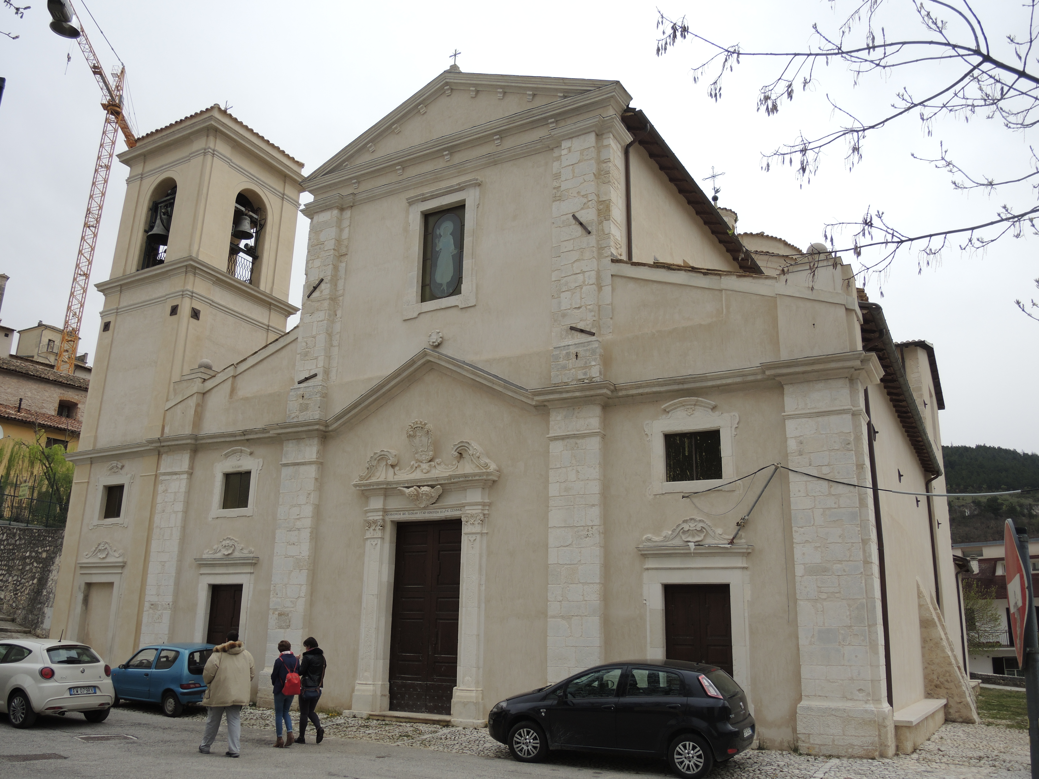 Goriano Sicoli: Chiesa di Santa Gemma